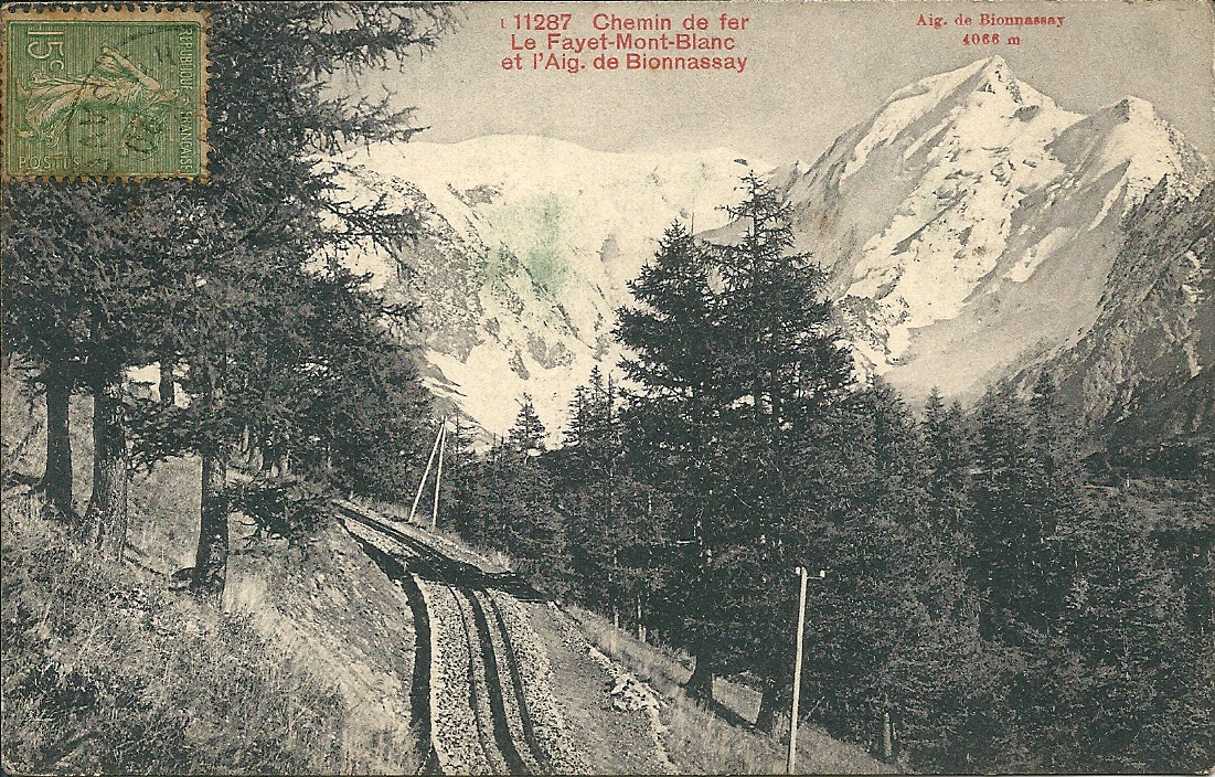 Le Chemin de fer Le Fayet - Mont-Blanc & l'Aiguille de Bionnassay - avant 1920 (date d'envoi postal de la carte)